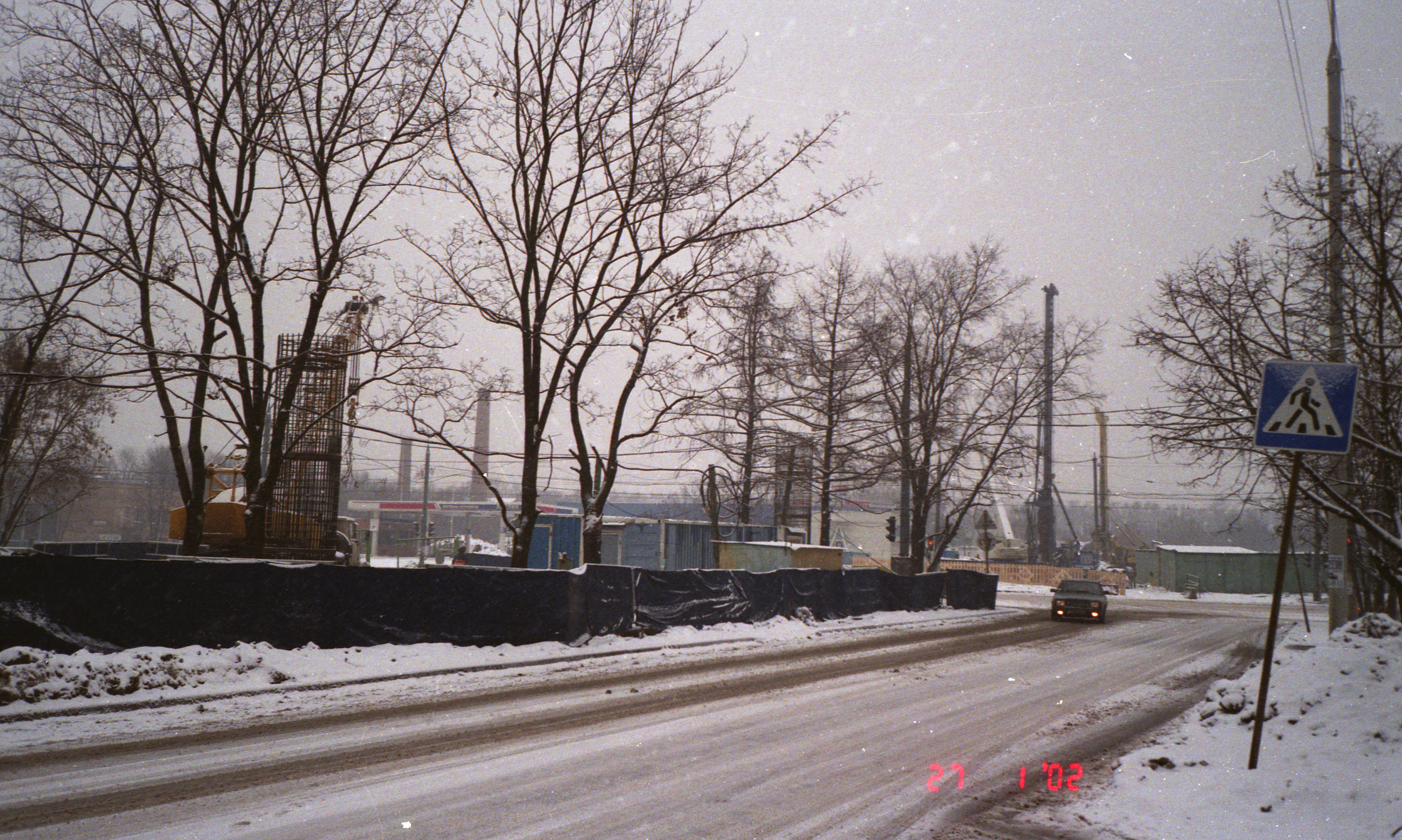 Olympus mju-II camera, Konica 200